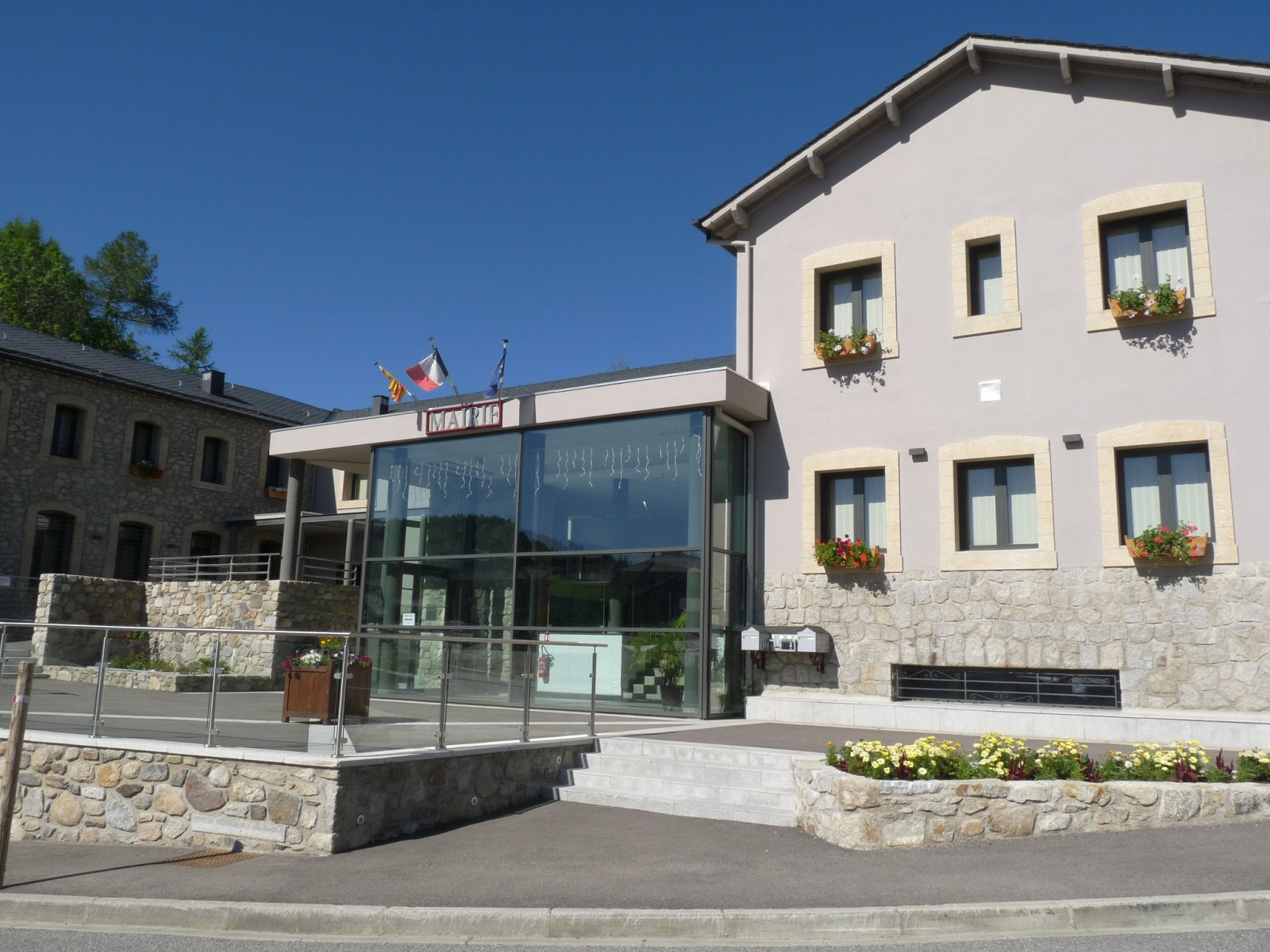 Mairie de Bolquère, P.O., France